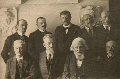 Kadra naukowa Uniwersytetu Stefana Batorego w Wilnie około 1922 r. Siedzą od lewej: prof. K. Zimmermann, prof. Wiktor Staniewicz, Władysław Mickiewicz, prof. Marian Zdziechowski, stoją od prawej: prof. Stanisław Pigoń, prof. Benedykt Kubicki, prof. Ferdynand Ruszczyc, prof. Józef Kallenbach, prof. Juliusz Kłos